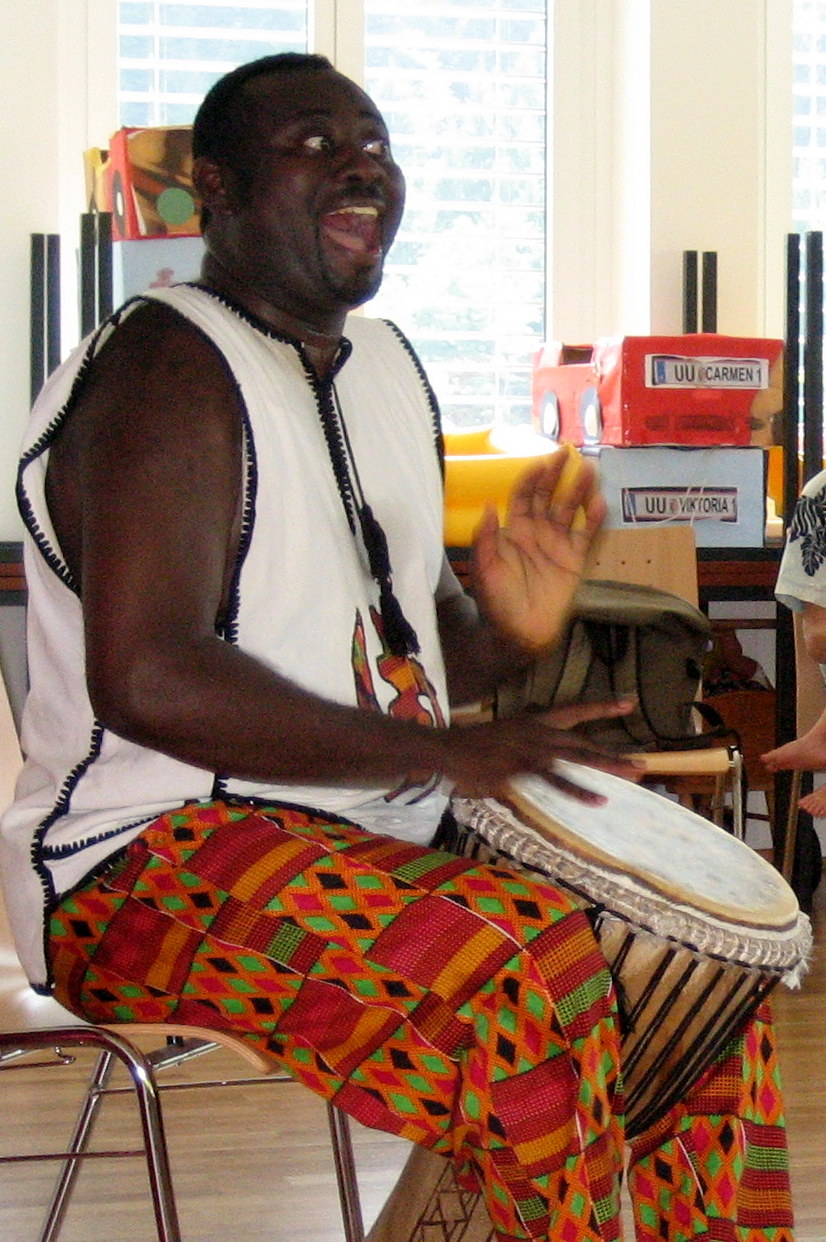 Patrick Addai beim Ferienspiel der Bibliothek St. Gotthard im Mühlkreis